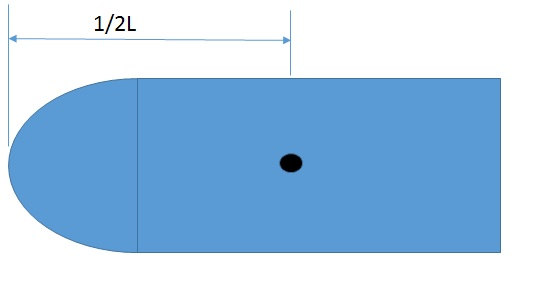 draaipunt van een schip als het gestopt ligt en geen trim heeft.